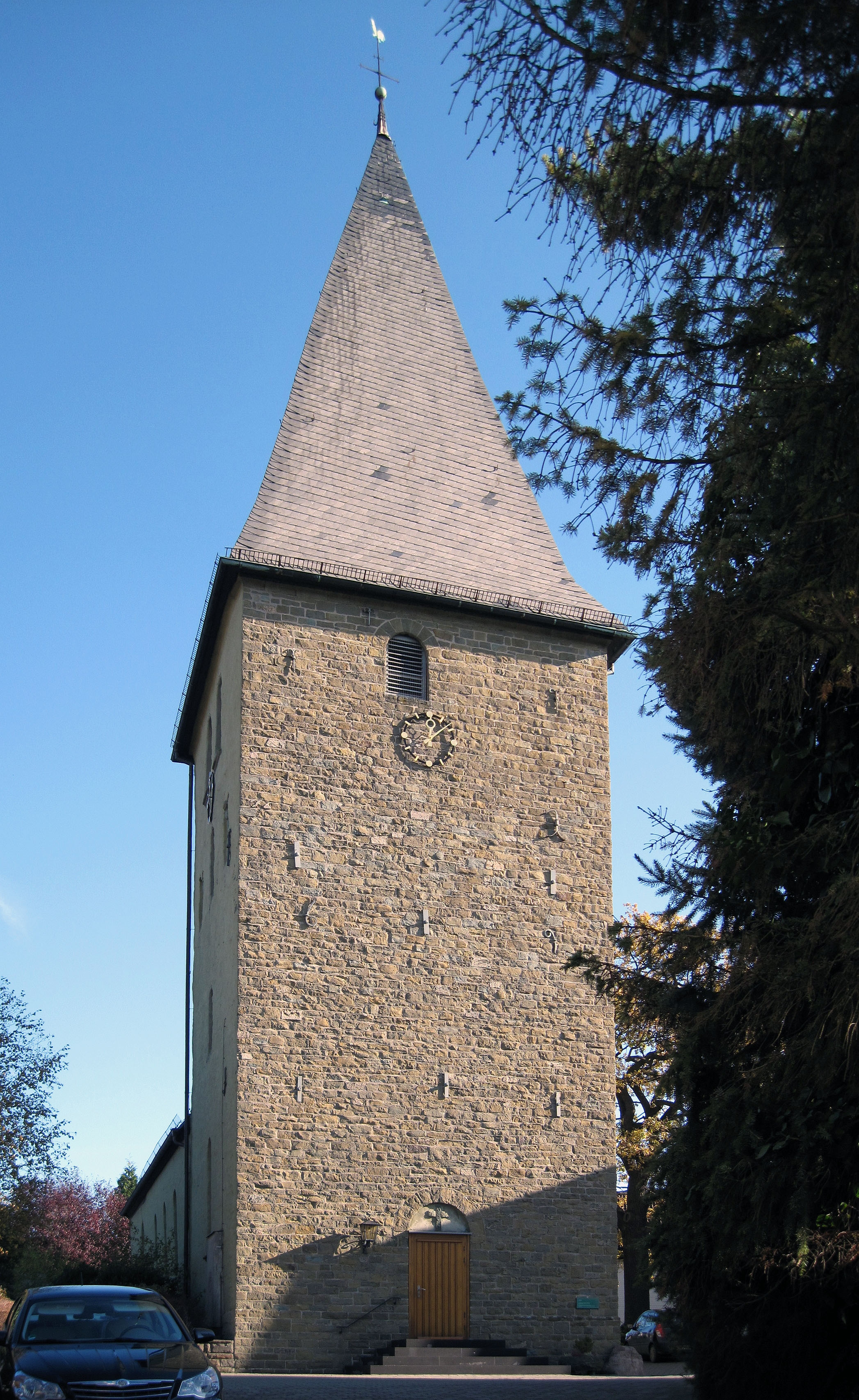 Werl, Hilbeck, Evangelische Kirche, Turmansich t2